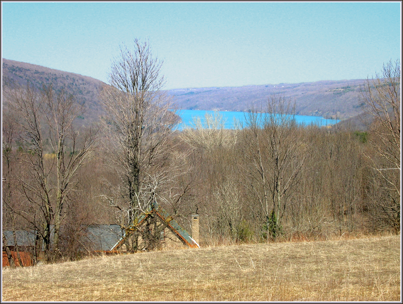 Immagine proveniente da en.wiki:[1]